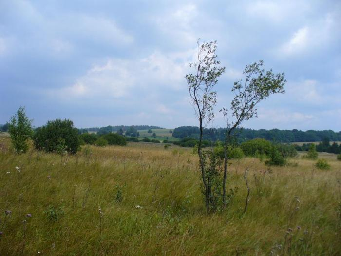 NPP Na požárech - rašeliniště